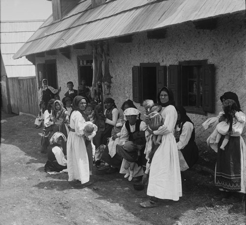 Bosna - vesničanky před obchodem kožešníka